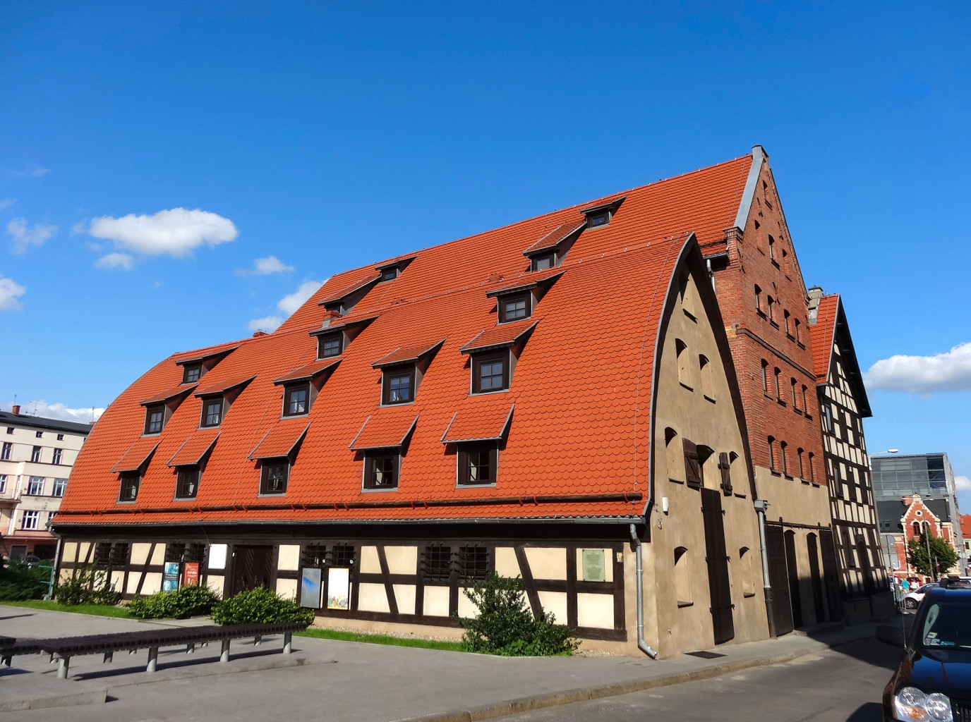 Spichrze nad Brdą w Bydgoszczy, zbud. w latach 1793-1800, od 1964 r. w gestii Muzeum Okręgowego